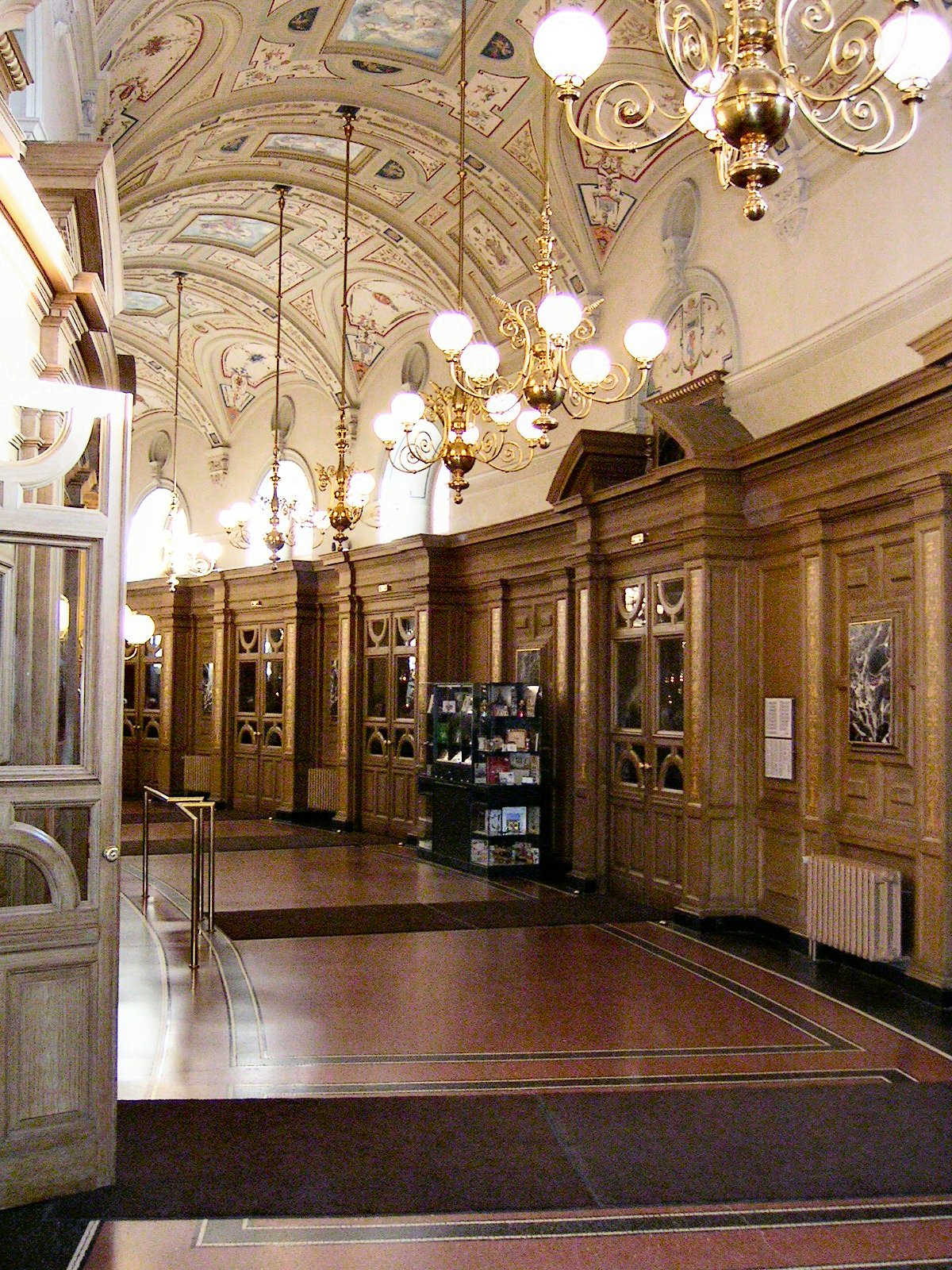 Eigangshalle der Dresdner Semperoper